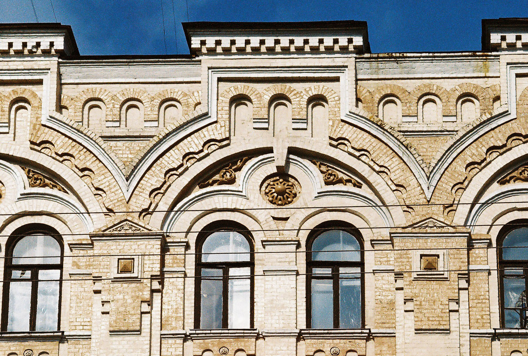 10 Б Хмельницкого